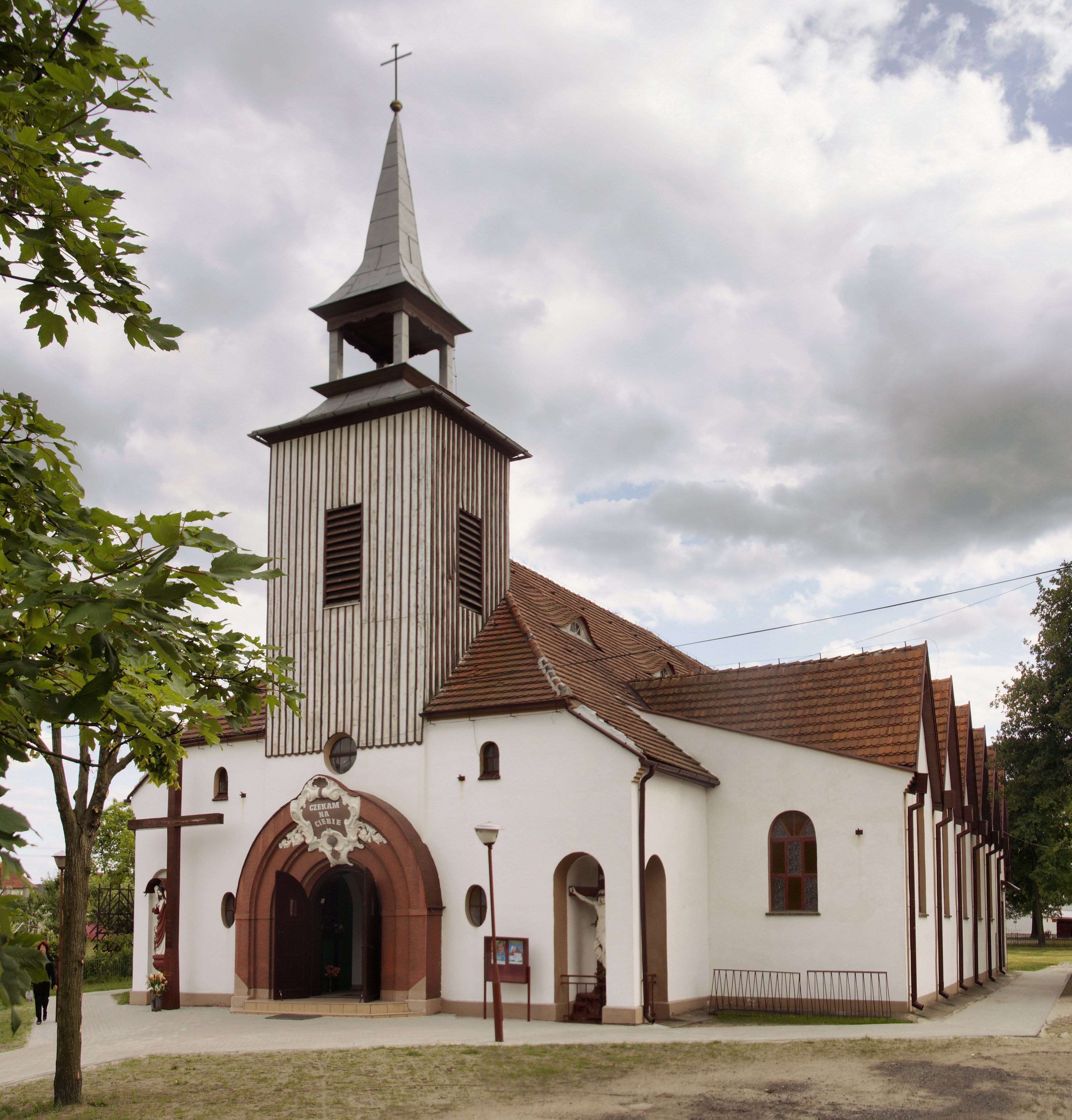 Małomice - dawny zbór ewangelicki, obecnie kościół polsko-kat. p.w. MB Nieustającej Pomocy, 1732